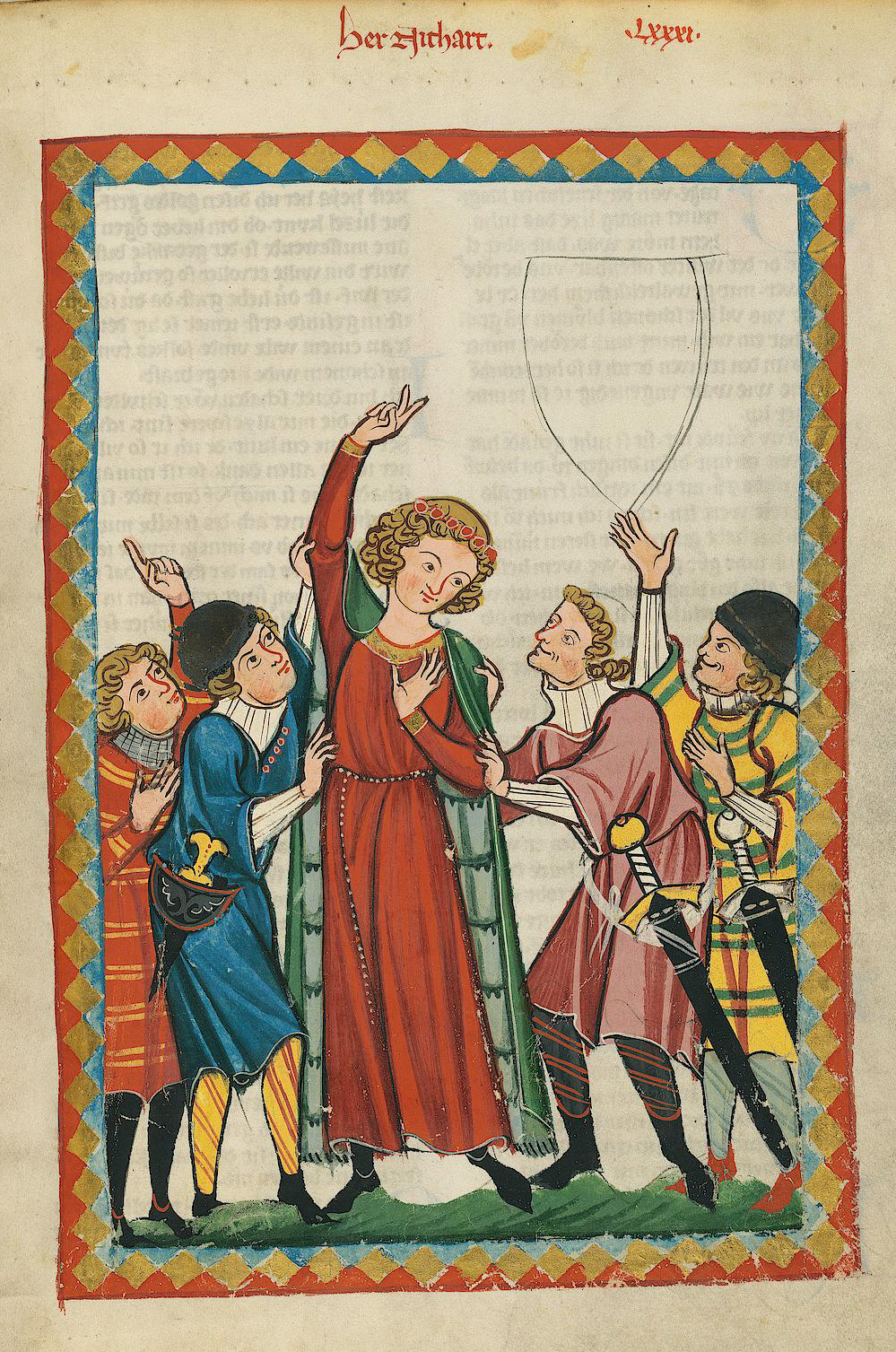 Codex Manesse, UB Heidelberg, Cod. Pal. germ. 848, fol. 273r, Herr Neidhart (Herr Nithart)